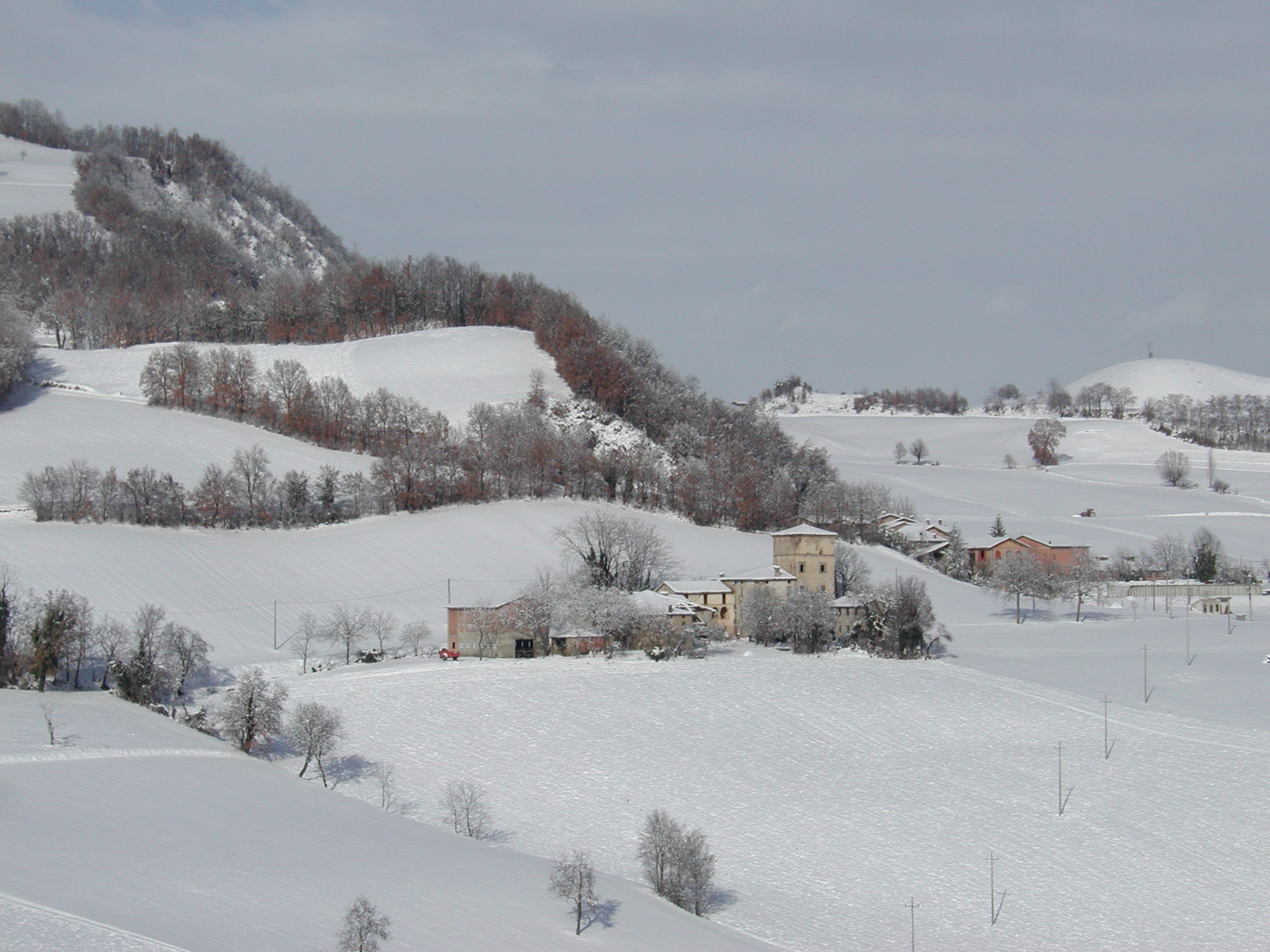 Carpineti, Appennino reggiano, Province of Reggio Emilia, italy made by me, Paolo da Reggio